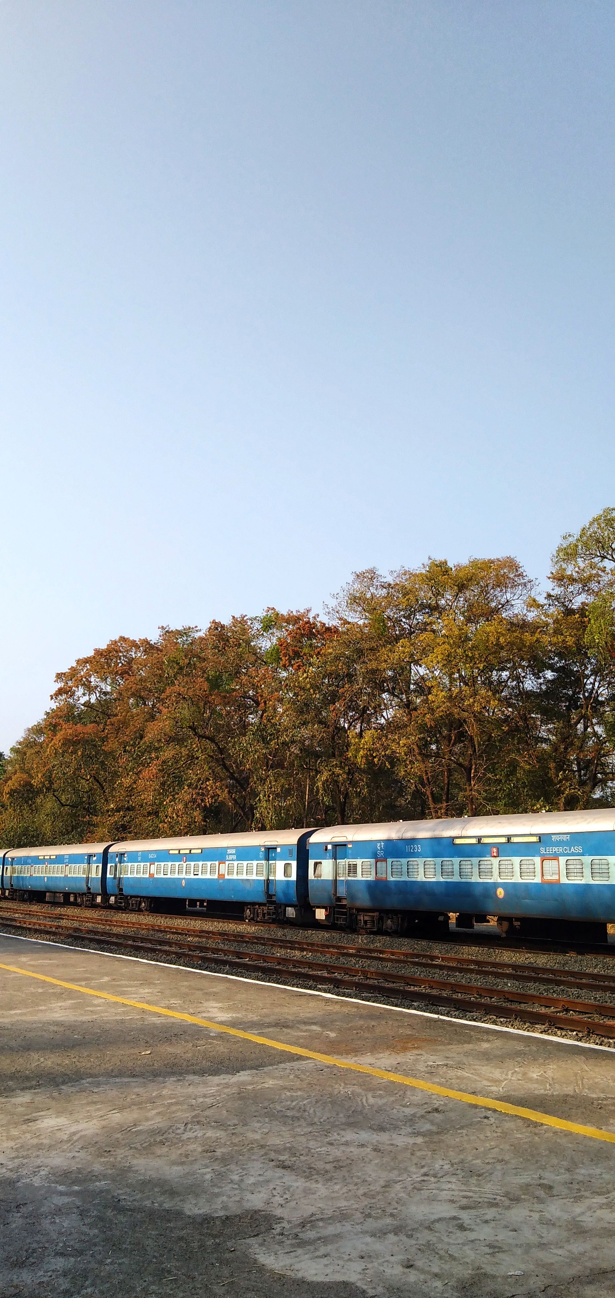 നിലമ്പൂർ റെയിൽവേ സ്റ്റേഷൻ